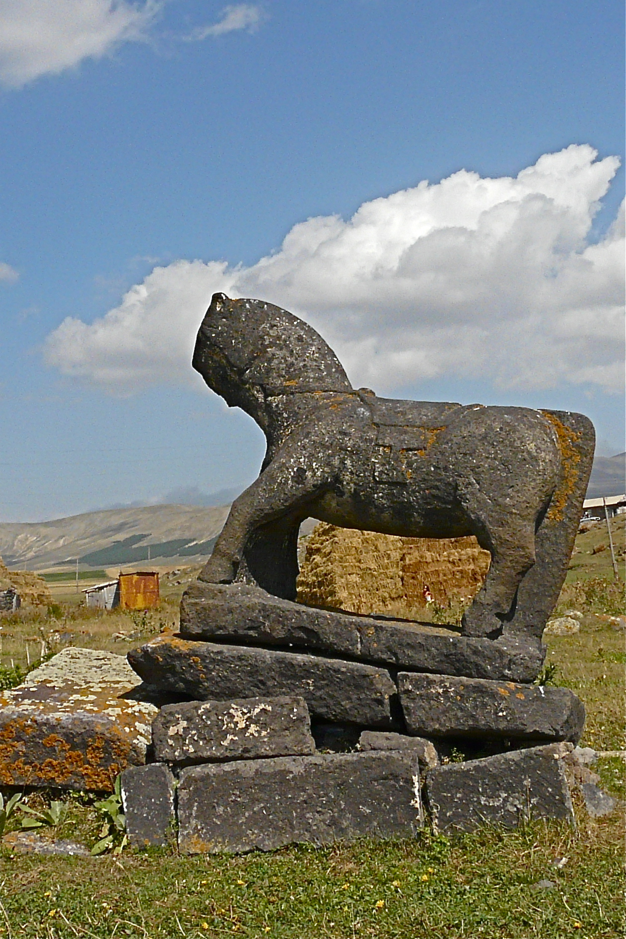 Een weide met nog enkele grafstenen van kinderen uit een ver verleden.